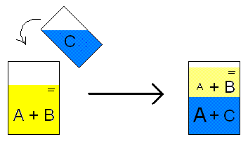 Esquema de extraÃ§Ã£o lÃ­quido-lÃ­quido. O solvente C Ã© vertido sobre a mistura original A+B; o sistema Ã© posto em agitaÃ§Ã£o e depois deixado em descanso, para a formaÃ§Ã£o de duas fases. O solvente C Ã© mais miscÃ­vel com A do que com B. Ocorre, assim, a separaÃ§Ã£o entre A e B por intermÃ©dio de C.